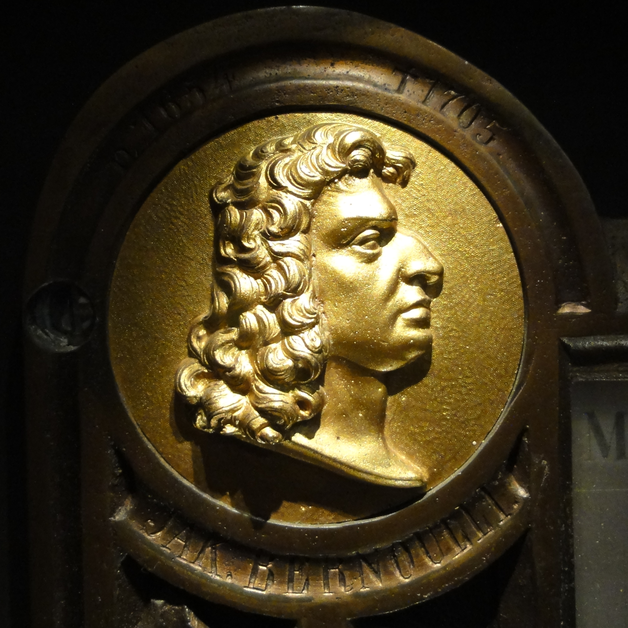 Basel — Historisches Museum Basel